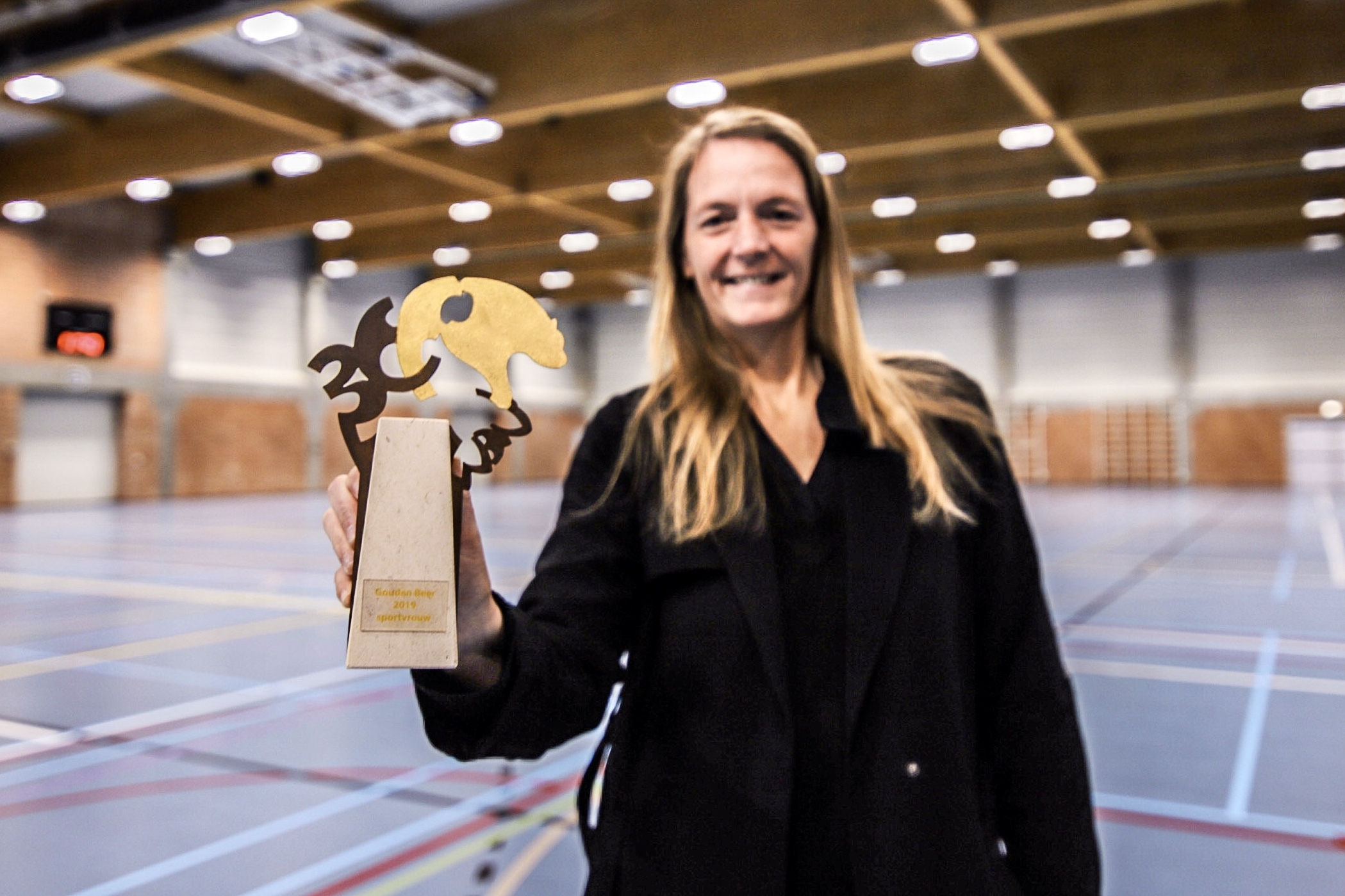 Schepen van sport, Patricia Waerniers, met de Gouden Beernem voor sportvrouw van het jaar 2019. De foto is genomen in Sporthal Drogenbrood.